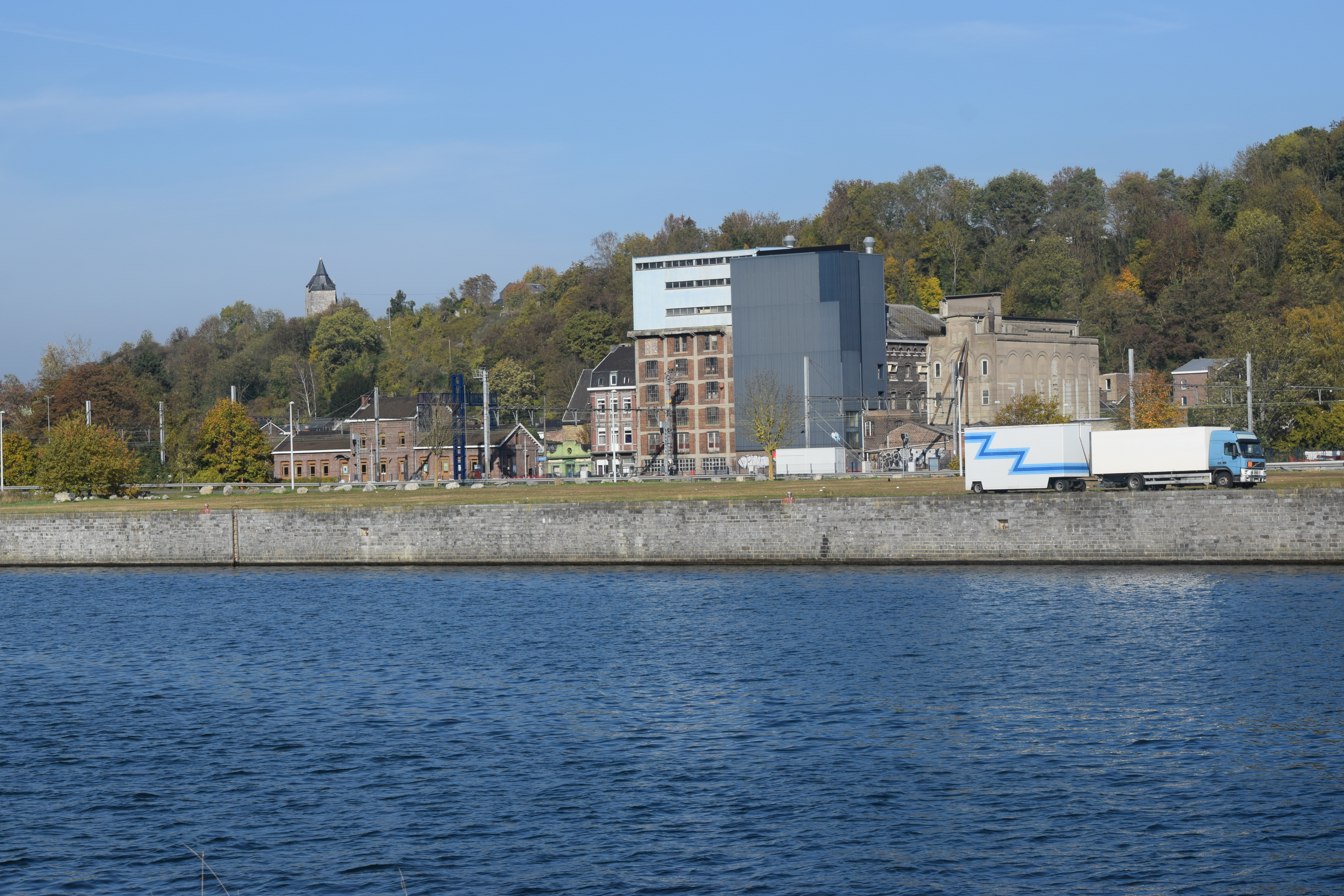 Vue de Huy, depuis la rive droite de la Meuse.